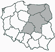 Polish III Liga, Group 1: Masovia, Łódź, Podlasie and Warmia-Masuria.